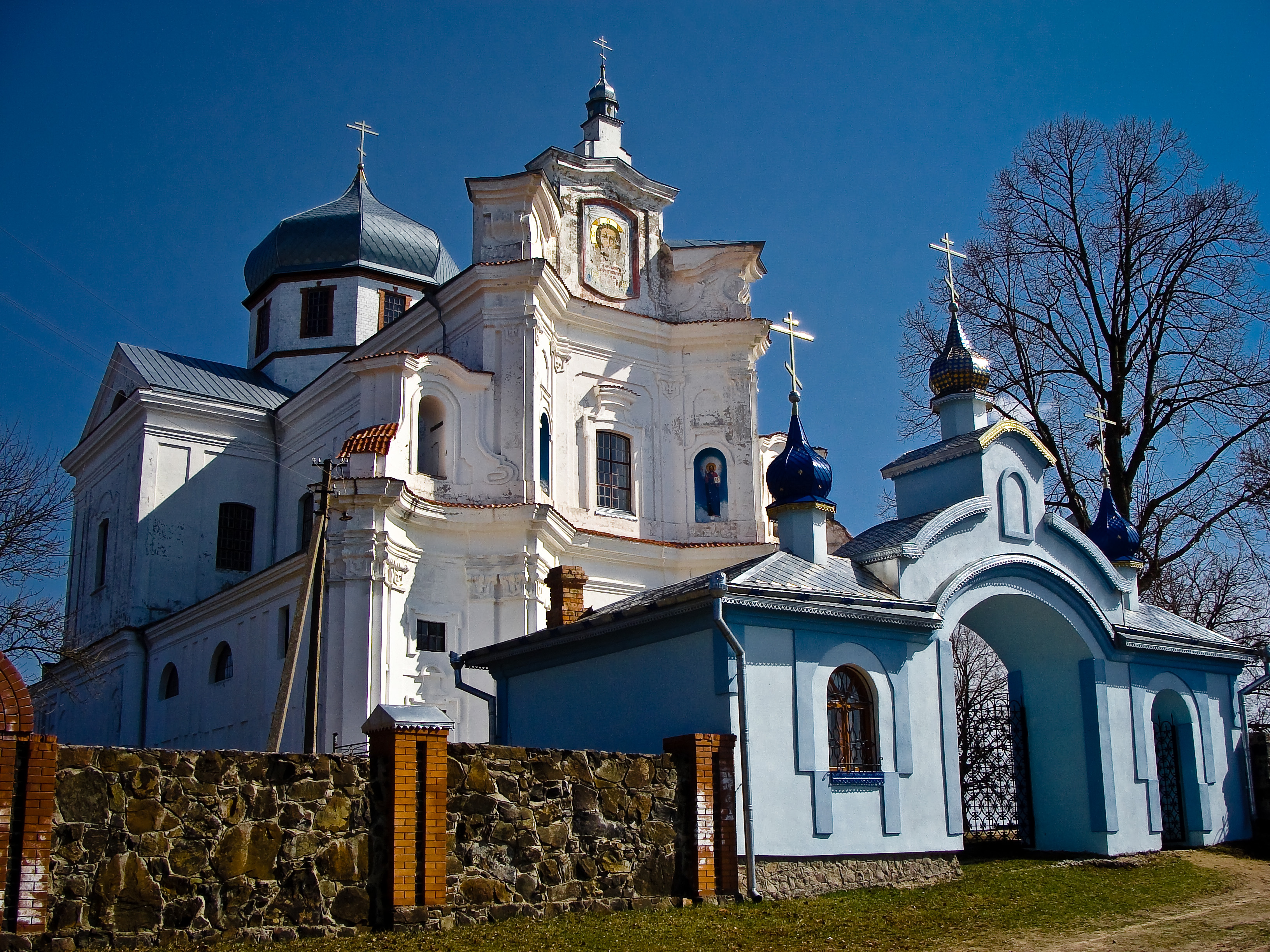 Домініканський костел (Старий Чорторийськ)